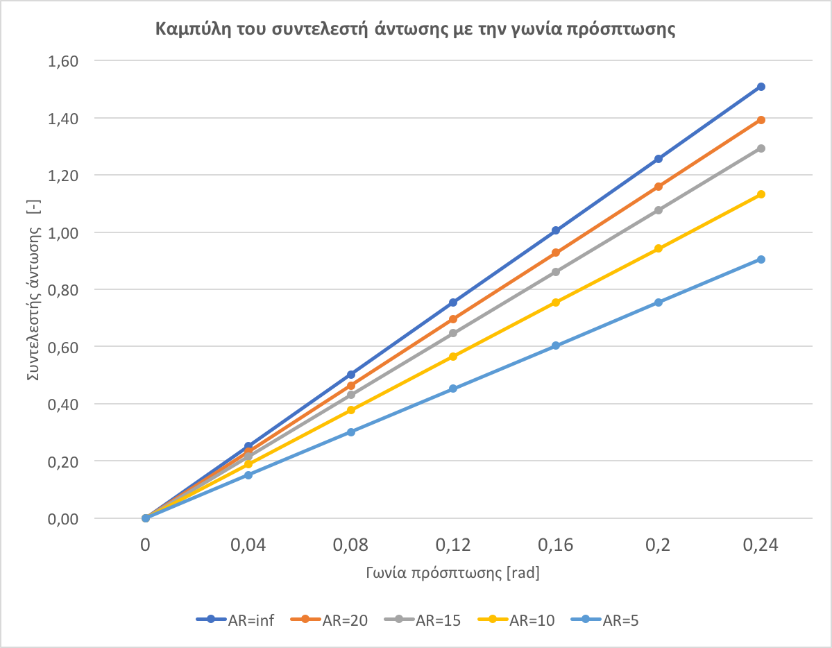 Καμπύλη του συντελεστή άντωσης με την γωνία πρόσπτωσης για διάφορες τιμές του λόγου επιμήκους